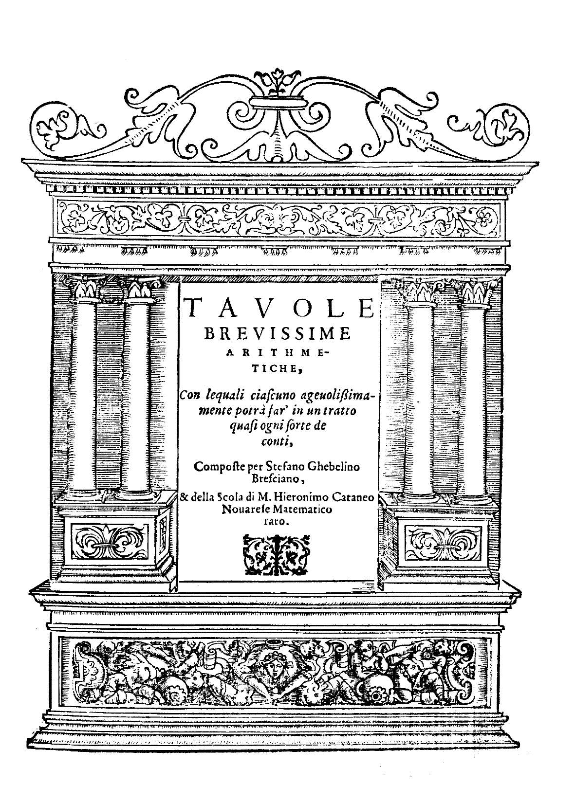 Tauole breuissime arithmetiche, con lequali ciascuno ageuolissimamente potra far' in un tratto quasi ogni sorte de conti, composte per Stefano Ghebelino Bresciano, .... - [Brescia : Vincenzo di Sabbio, 1568] (In Brescia : appresso Vincenzo di Sabbio, 1568). - [10], 33, [1] c. 4º .